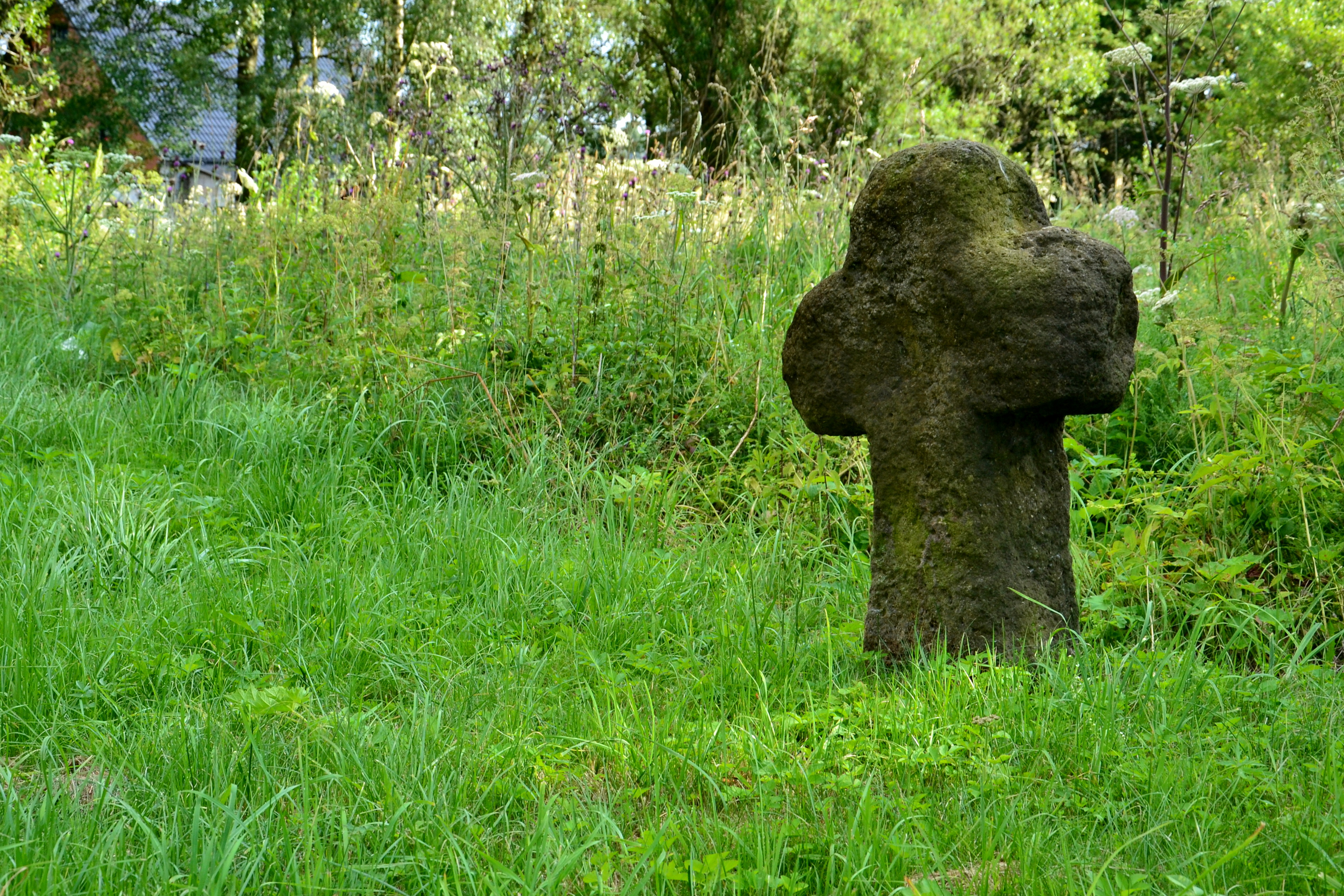 Smírčí kříž ze 16. století u domu čp. 47